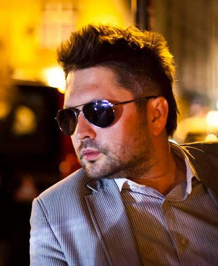 Bartosz Tomaszek - kompozytor